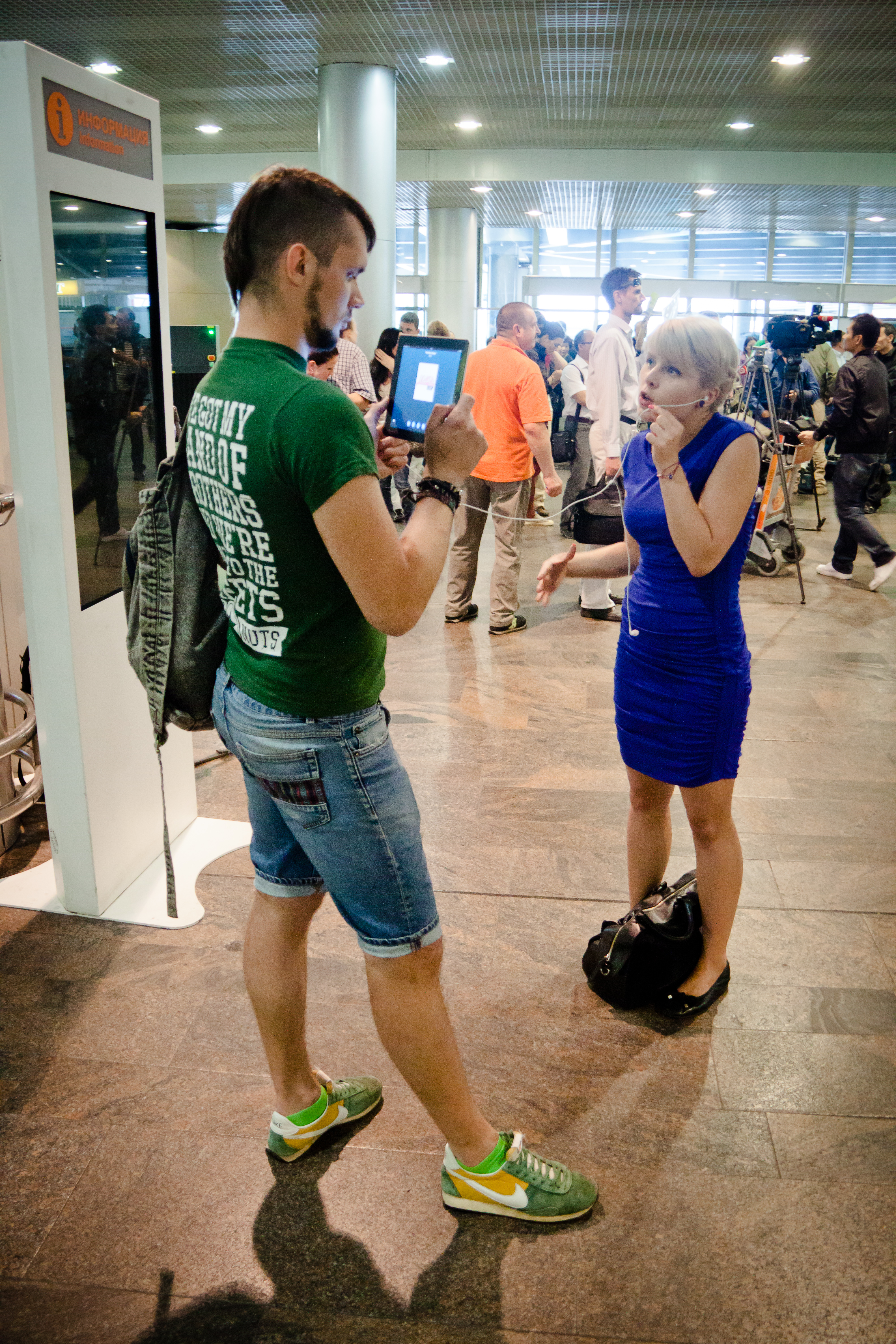 Аэропорт Шереметьево, Терминал F в день прибытия Эдварда Сноудена - съёмочная группа телеканала "Дождь" (Екатерина Базанова)